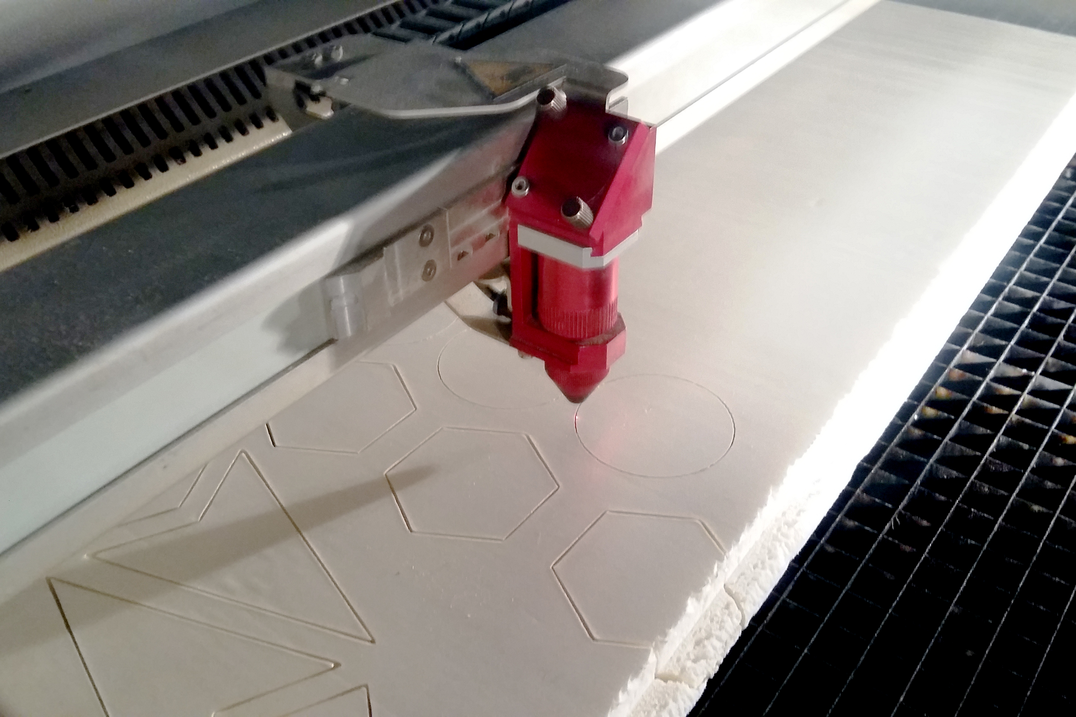 Machine de découpe laser en train de couper des formes géométriques sur du polystyrène expansé, La Villette, Paris, Février 2017.